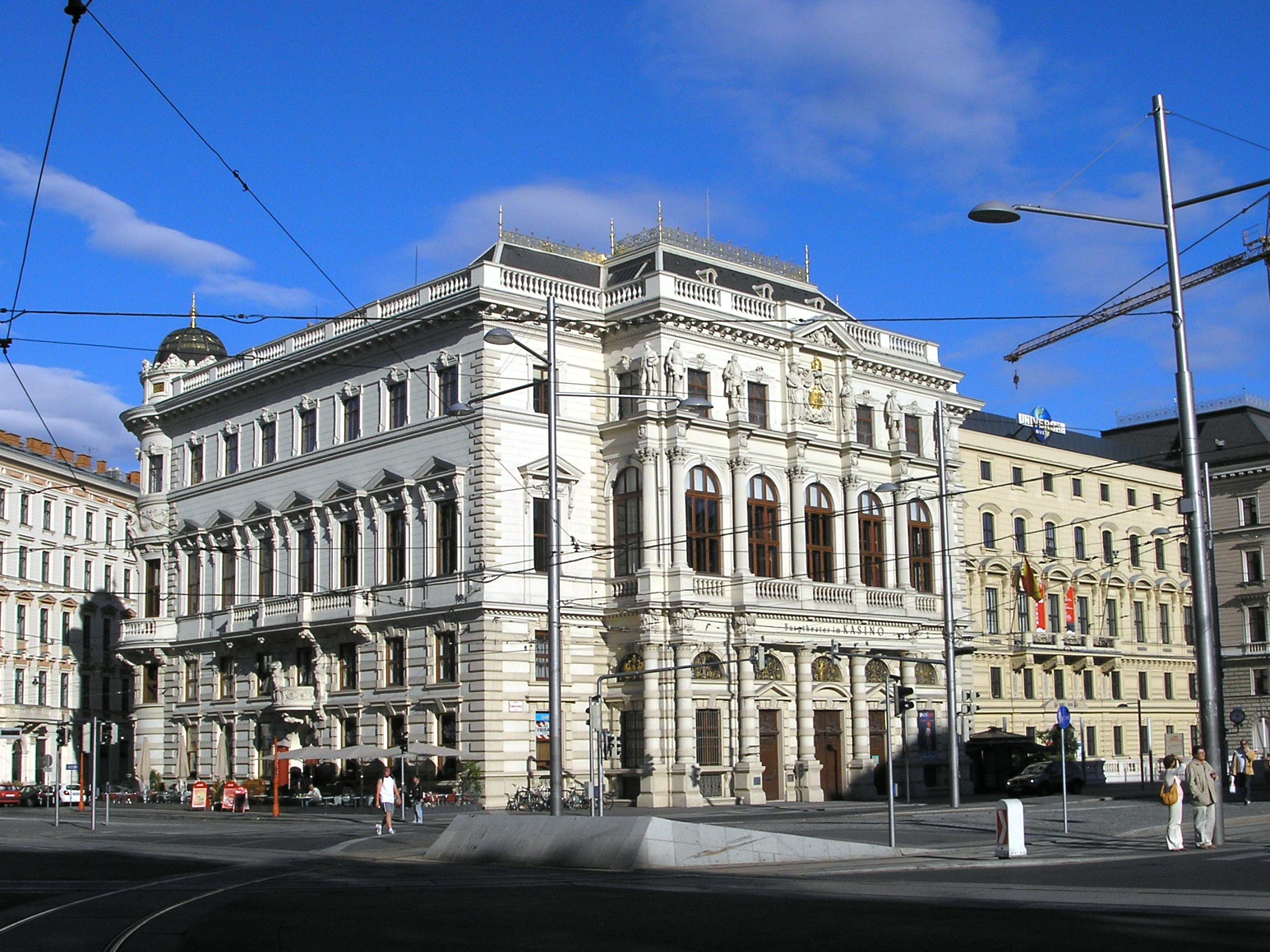 Kasino Burgtheater, Schwarzenbergplatz. Erbaut im Auftrag von Erzherzog Ludwig Viktor durch Baron Heinrich von Ferstel.